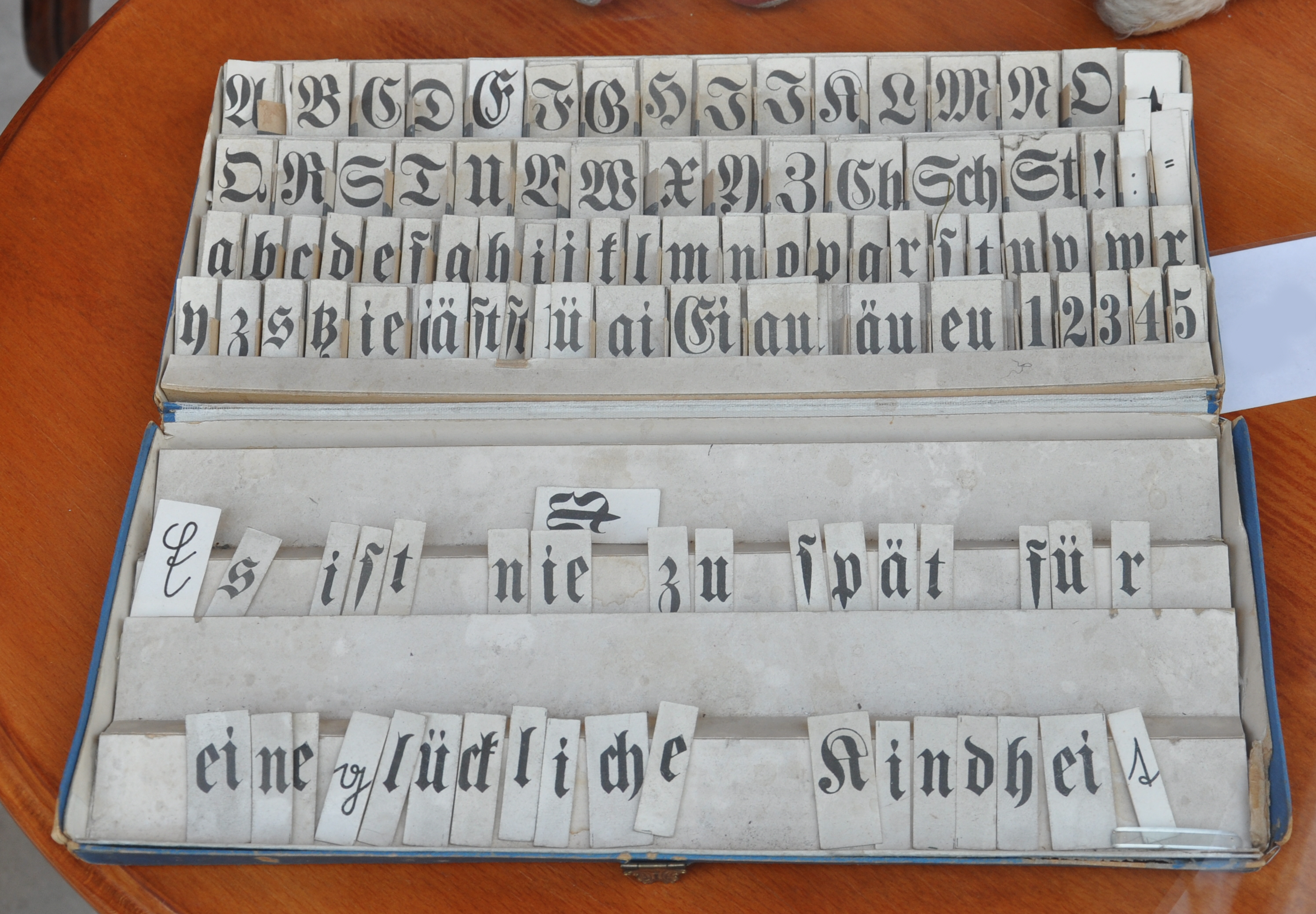 Lesekasten (in Frakturschrift, mit Ausnahme dreier Kärtchen "E", "g" und "t" in Sütterlinschrift, die nicht zum Rest passen.) Gesehen im Wiener Antiquitätenhandel.